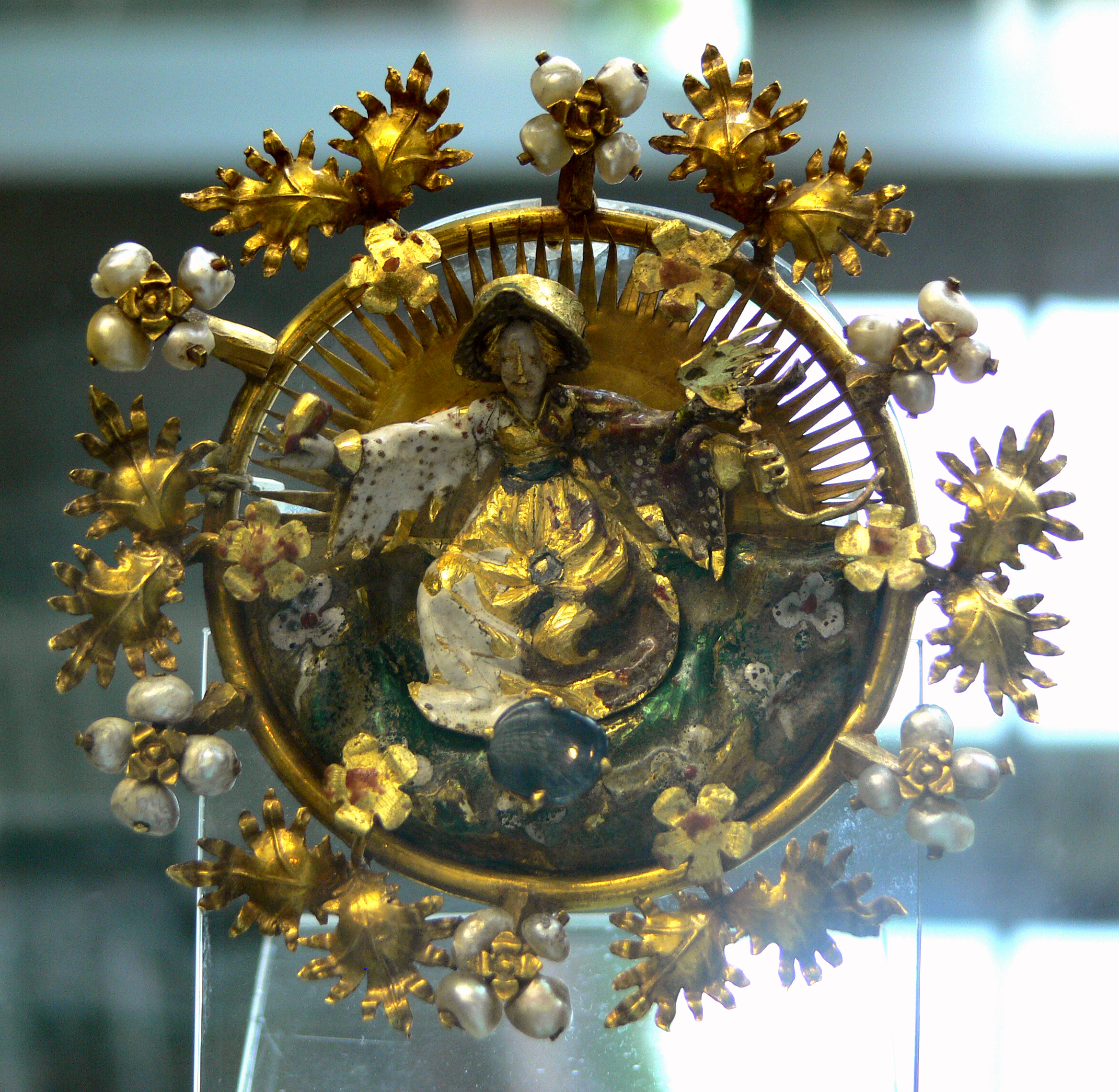 Fürspan mit Falknerin; Gold, Email en ronde bosse, Saphir, Perlen; Burgund Anfang 15. Jh. Kunstgewerbemuseum Berlin, Inv. Nr. F 1364